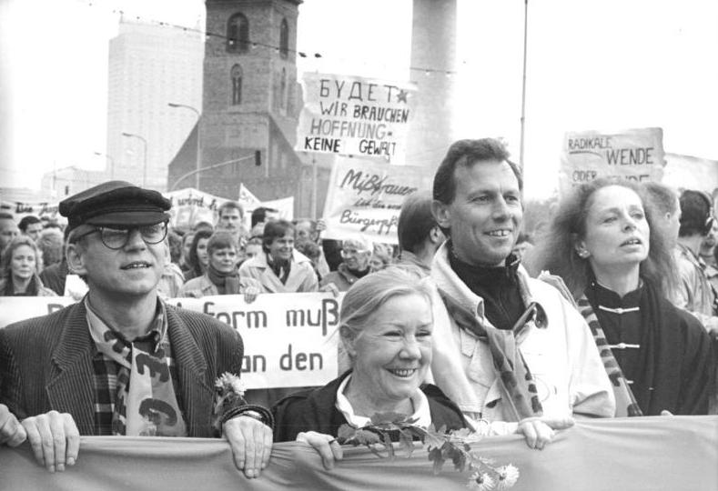 ADN-ZB Lemmer-4.11.89 Berlin: Demonstration Zehntausende Bürger beteiligten sich an einer Demonstration, zu der Berliner Kunst- und Kulturschaffende ins Zentrum der Hauptstadt eingeladen hatten. Unter den Teilnehmern war auch die Schauspielerin Käthe Reichel.